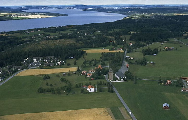 Brunflo kyrka och kastal i bildens nedre del. Motiv: Brunflo Nyckelord: Flygbilder, Riksintressen Kategori: Kyrkby Brunflo kyrka och kastal i bildens nedre del.